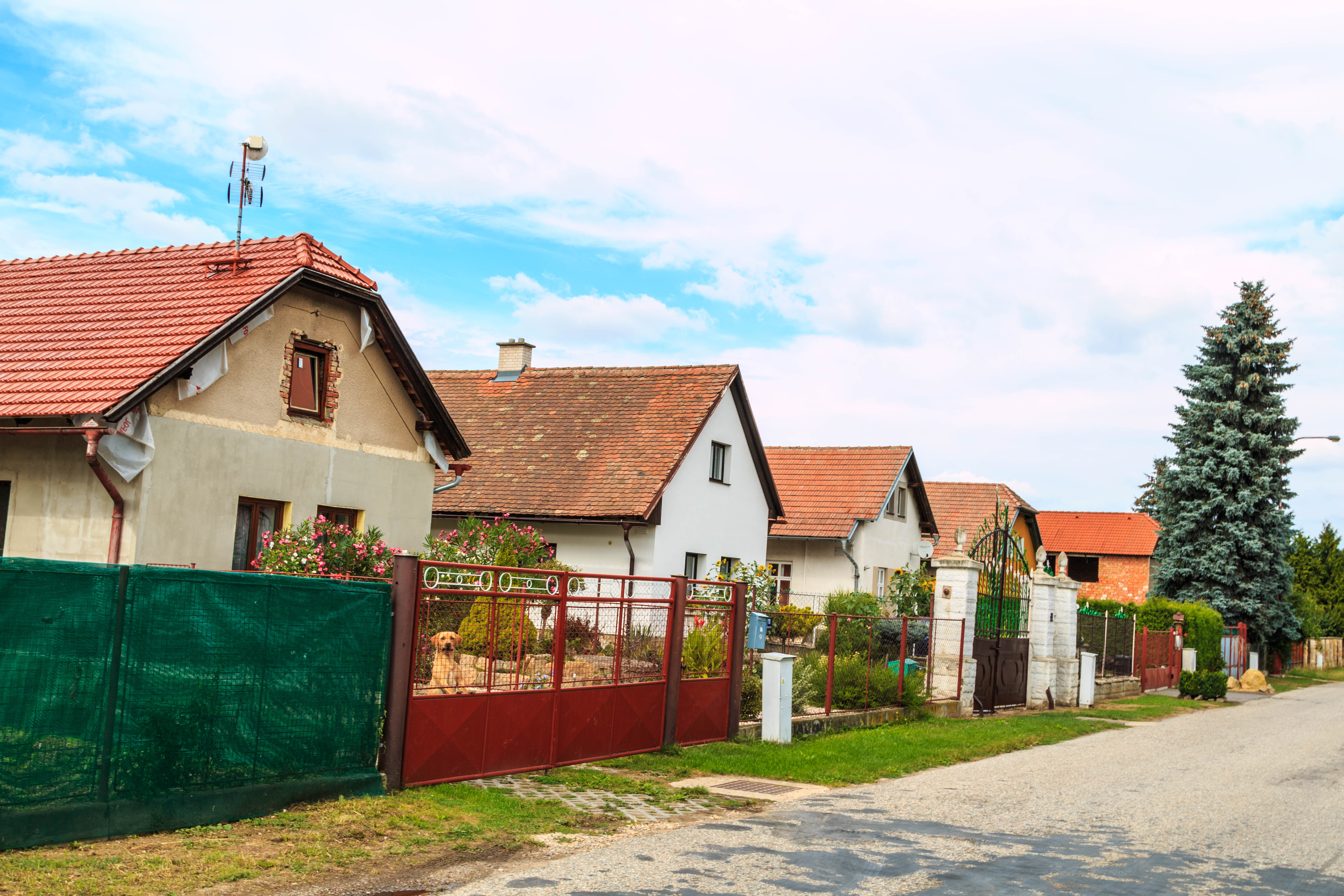 Nové Holešovice č. 11